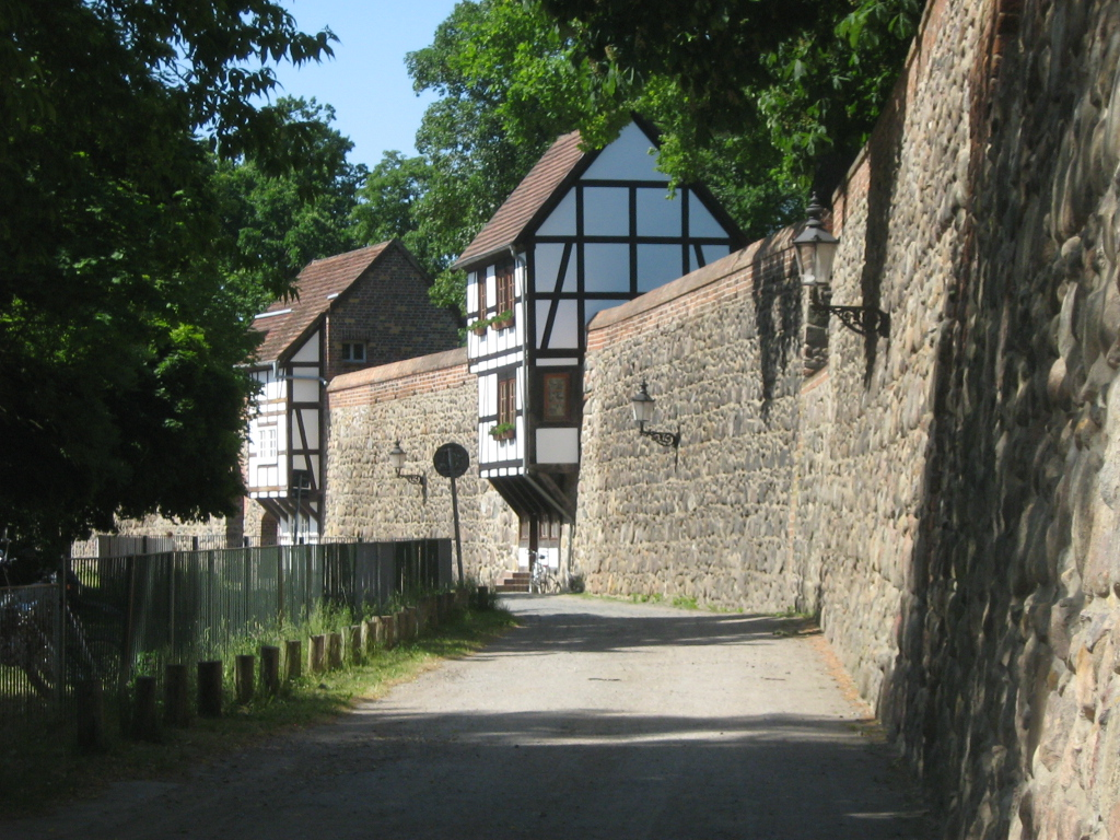 Wiekhus in der Neubrandenburger Stadtmauer.